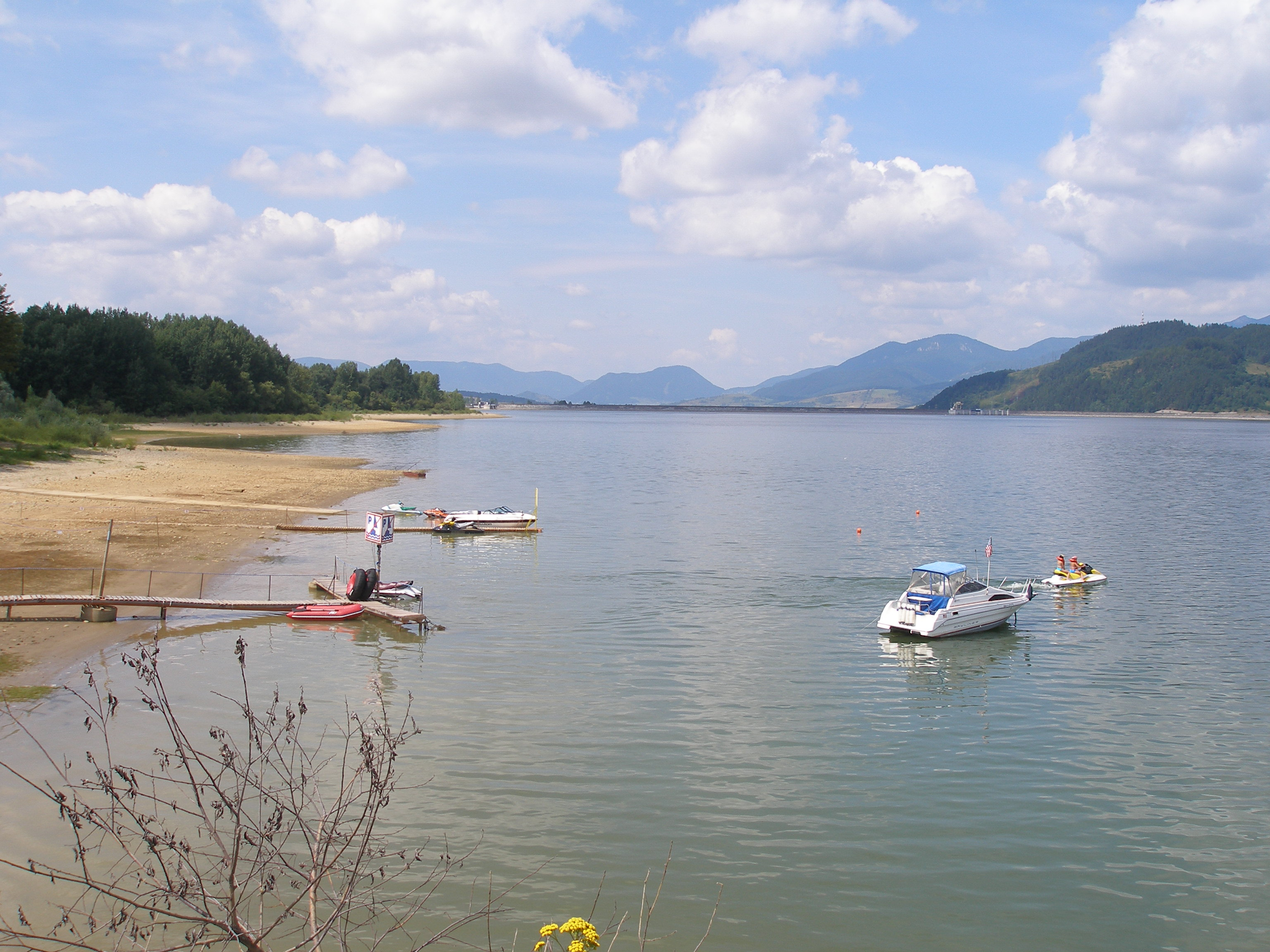 Verejná rekreačná oblasť vodná nádrž Liptovská Mara, región Liptov, okr.Liptovský Mikuláš